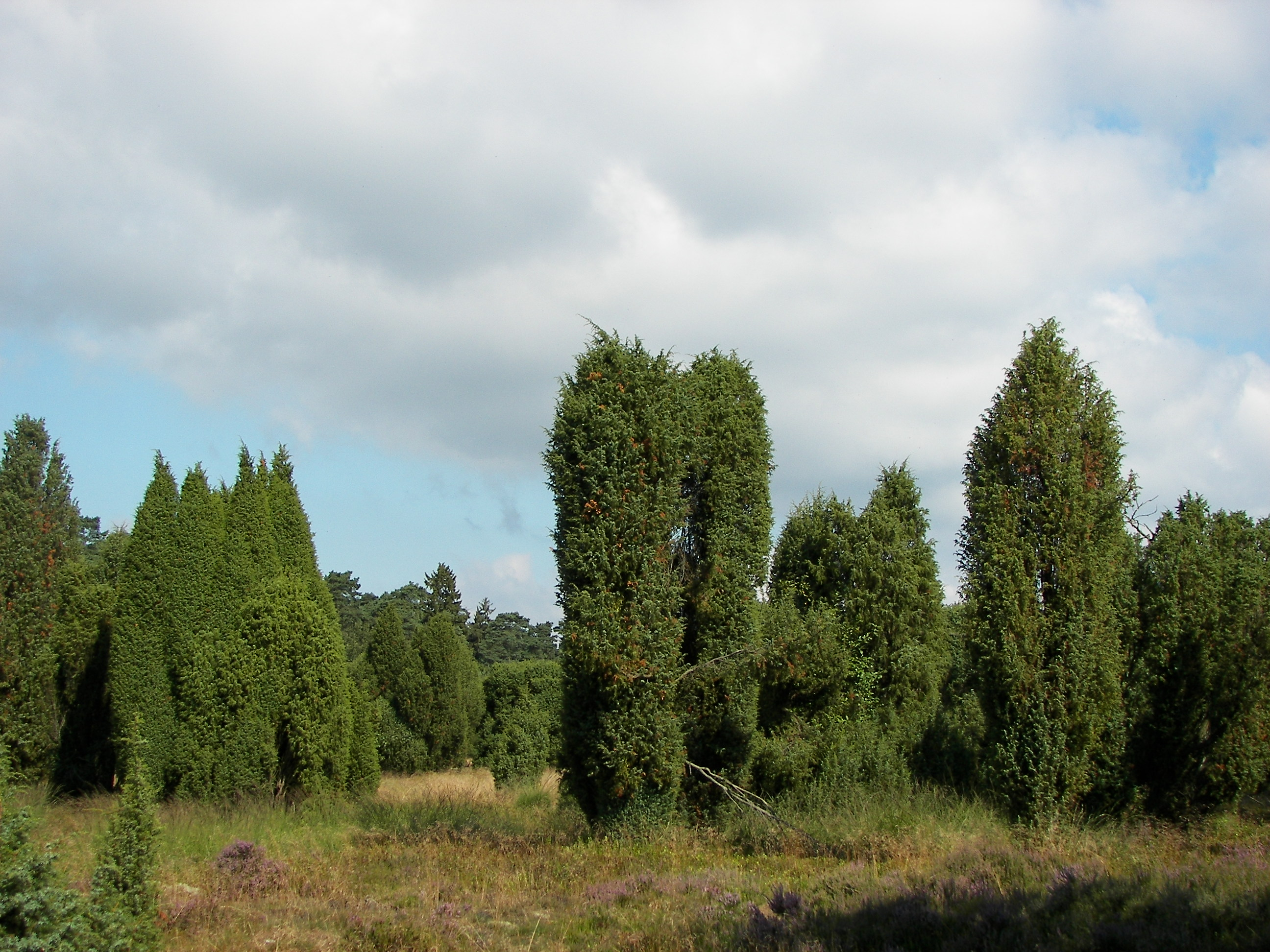 Lüneburger Heide bei Niederhaverbeck